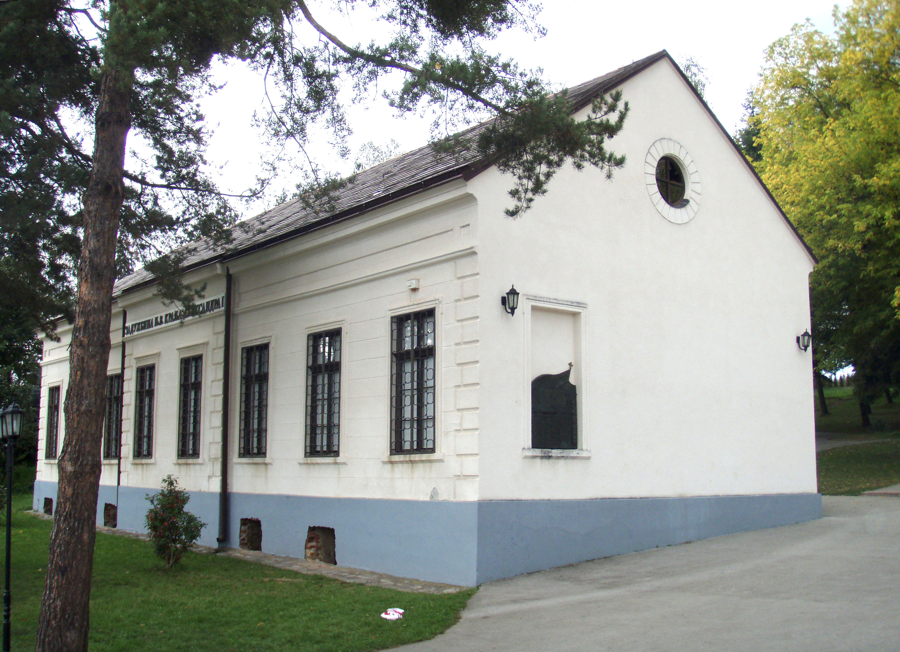 Museum in Takovo, Serbia/Musée de Takovo en Serbie, consacré à la seconde révolte serbe contre les Ottomans